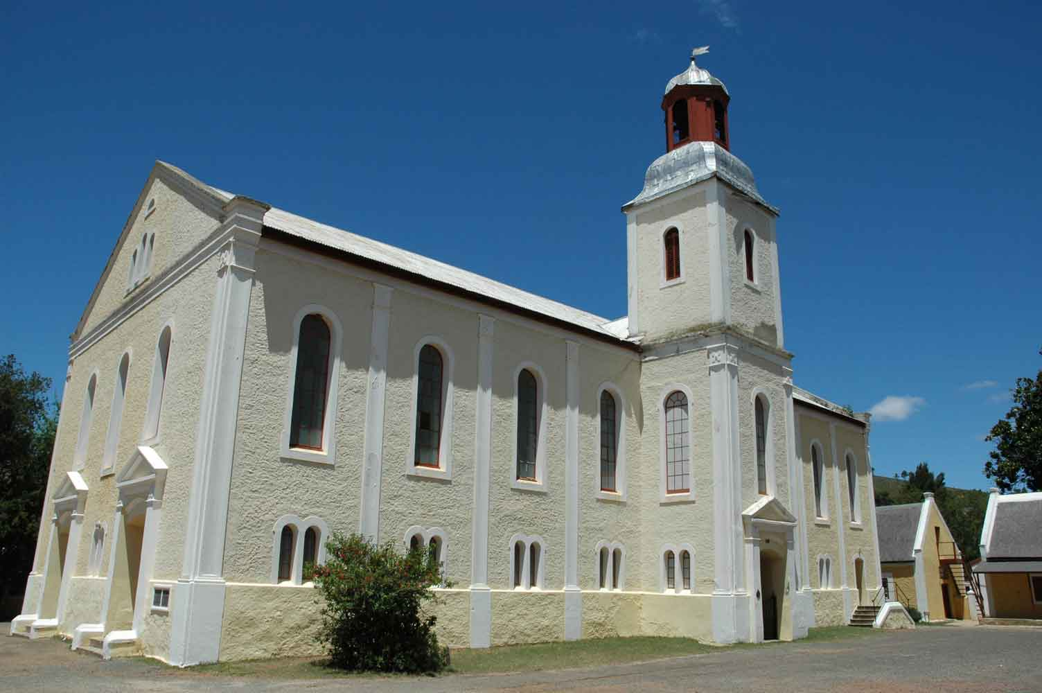 Kirche der Moravian Church in Genadendal.